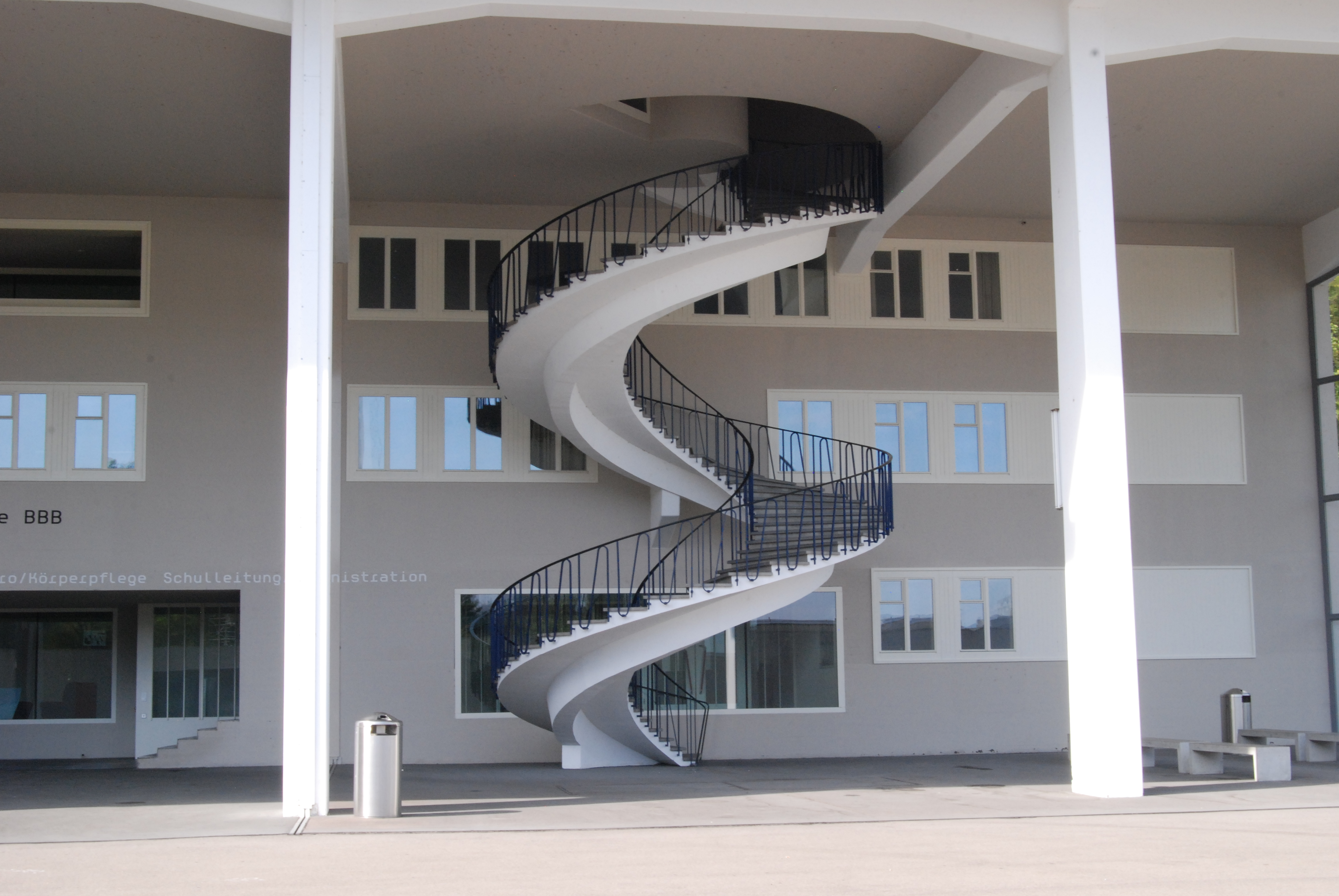 Wendeltreppe im ehemaligen Wohlfahrtsgebaeude der Firma Brown Boveri (BBC), Baden, Schweiz. Heute Berufsfachschule BBB Martinsberg.